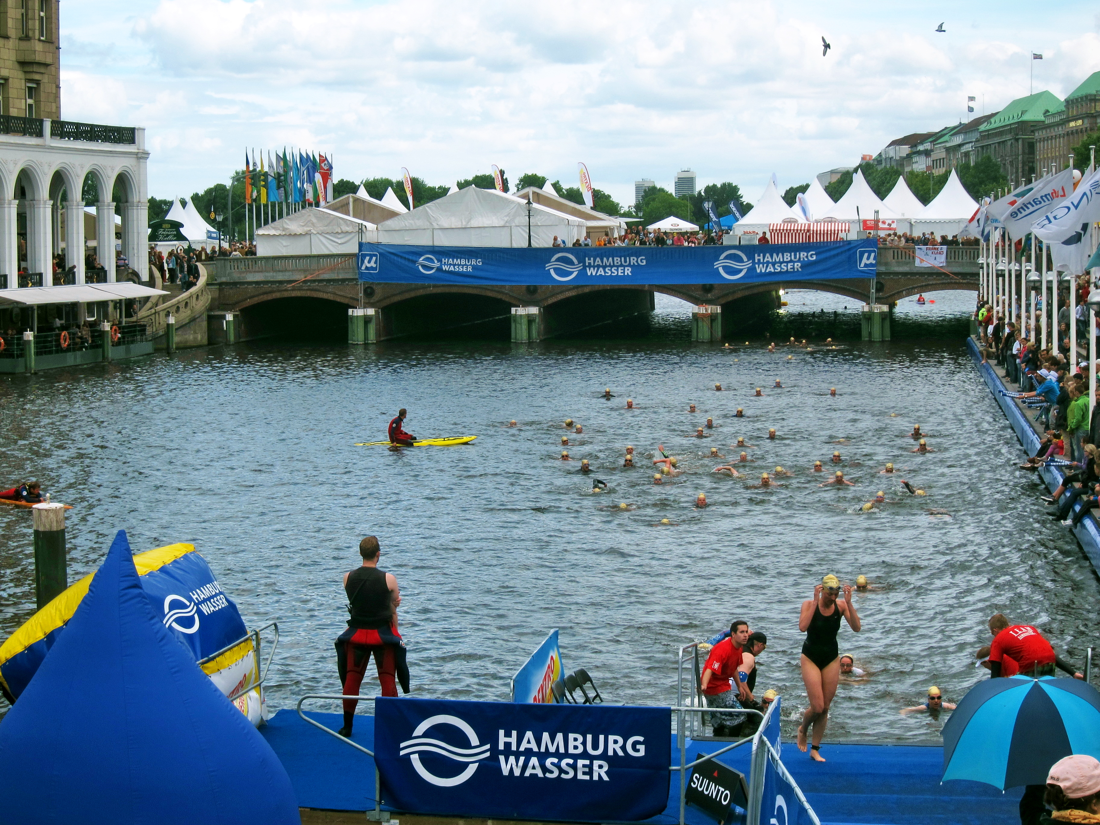 Sieger wurde nach 750 Metern Schwimmen, 20 Kilometern Radfahren und fünf Kilometern Laufen der Südafrikaner Richard Murray vor dem spanischen Ex-Weltmeister Javier Gomez. in der Profi Klasse der Männer. Steffen Justus landete als bester Deutscher auf dem dritten Platz. Bei den Frauen sicherte sich den Sieg die Australierin Erin Densham vor ihrer Landsfrau und Vorjahressiegerin Emma Moffatt und der Amerikanerin Sarah Groff. Neben den 130 Top-Athleten nahmen auch 10 000 Jedermann-Teilnehmer in Hamburg zum größten Dreikampf der Welt teil. Absperrbänder waren über die ganze Innenstadt verteilt : 250.000 Zuschauer fanden dahinter ihre Aussichtspunkte. Im Bild sind Hobby Teilnehmer zu sehen die am Rathaus die Binnenalster nach der ersten, der Schwimmdisziplin das Wasser verlassen.